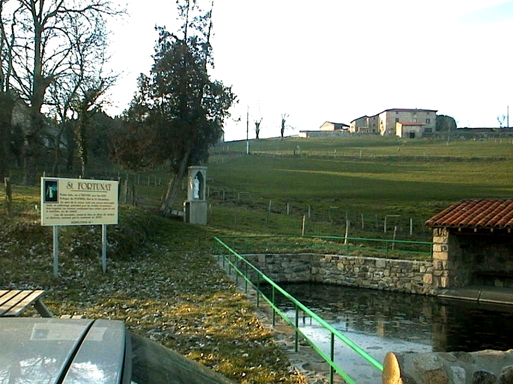 Fontaine St Fortunat à 42540 Croizet sur Gand